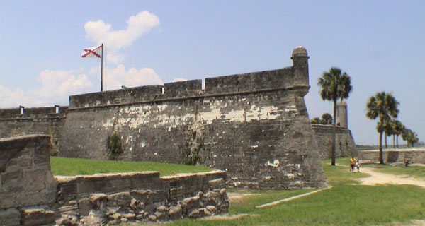 Castillo de San Marcos w St. Augustine. Widok twierdzy od strony południowej.